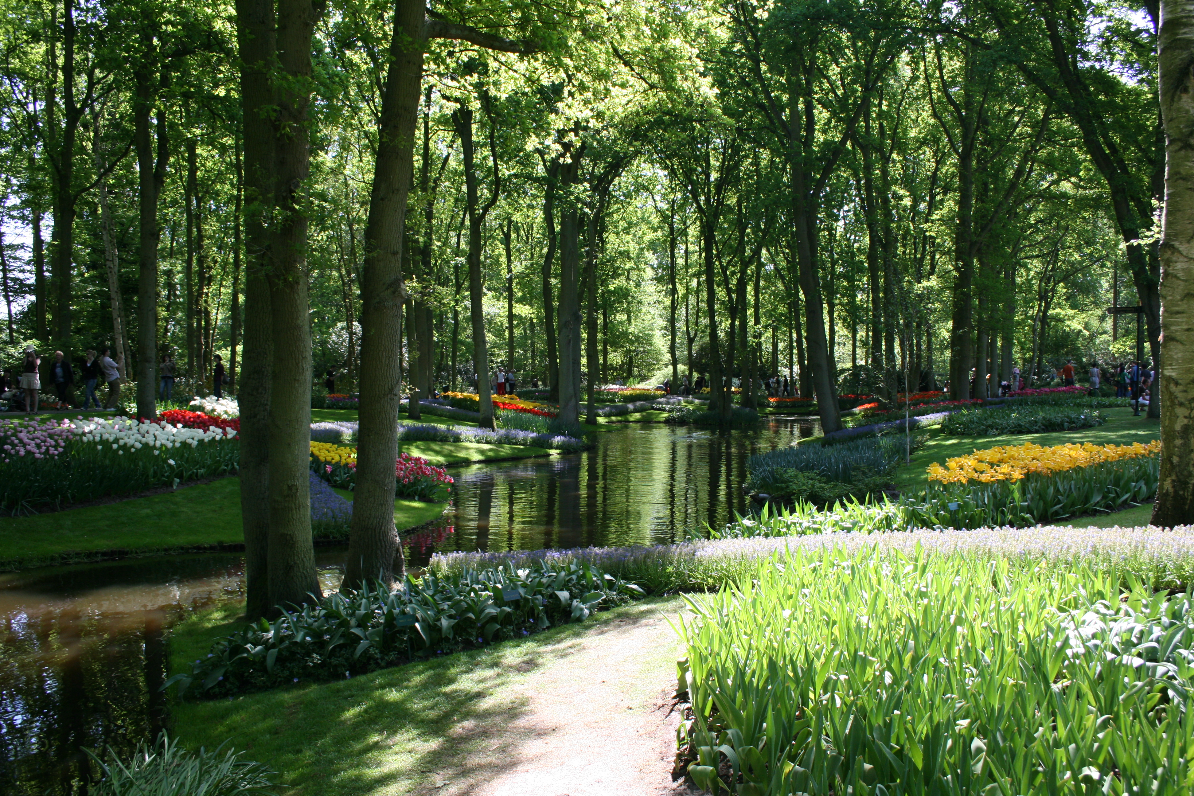 Vy från Keukenhof blomsterpark